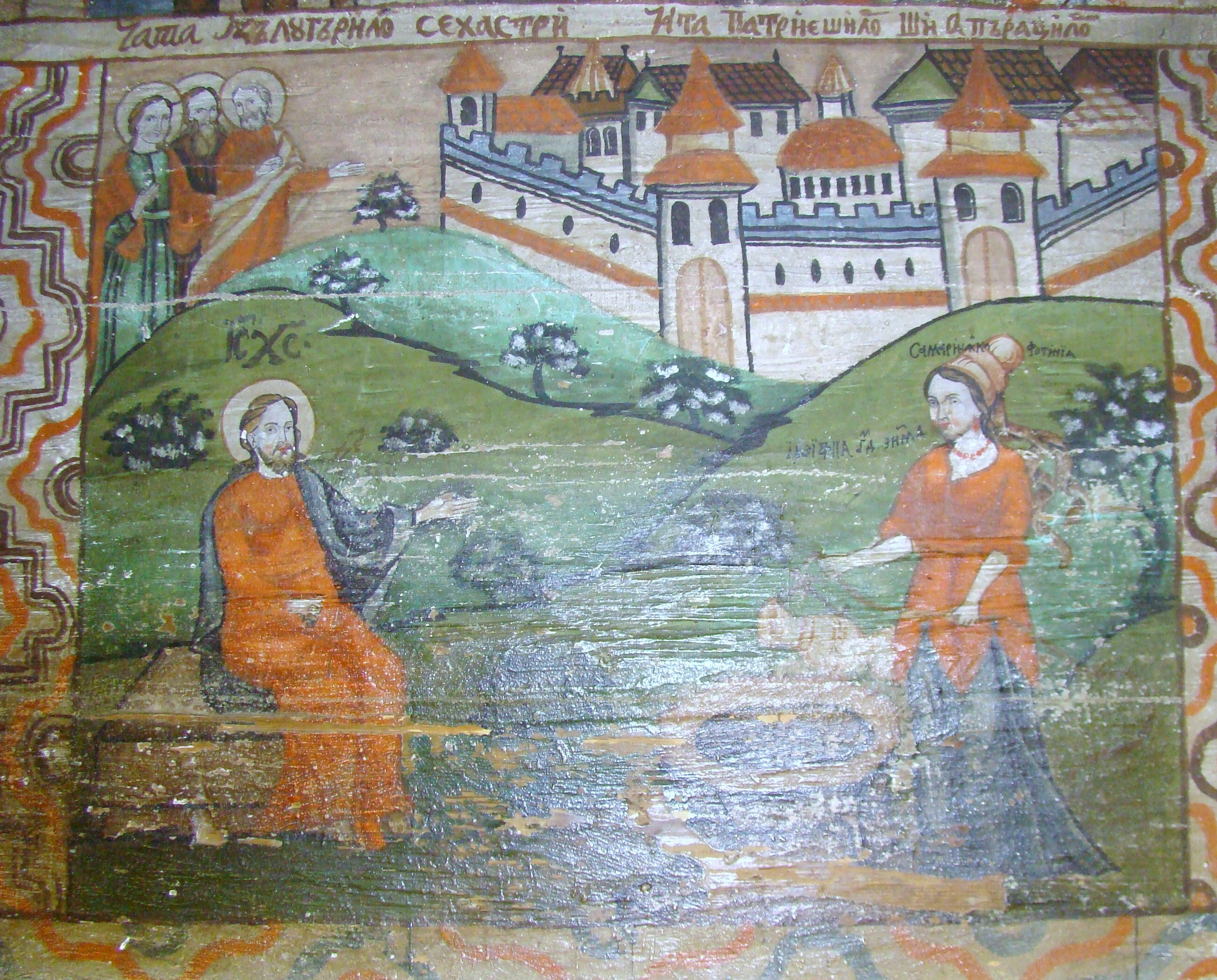 Biserica de lemn "Cuvioasa Paraschiva" , sat POIENILE IZEI